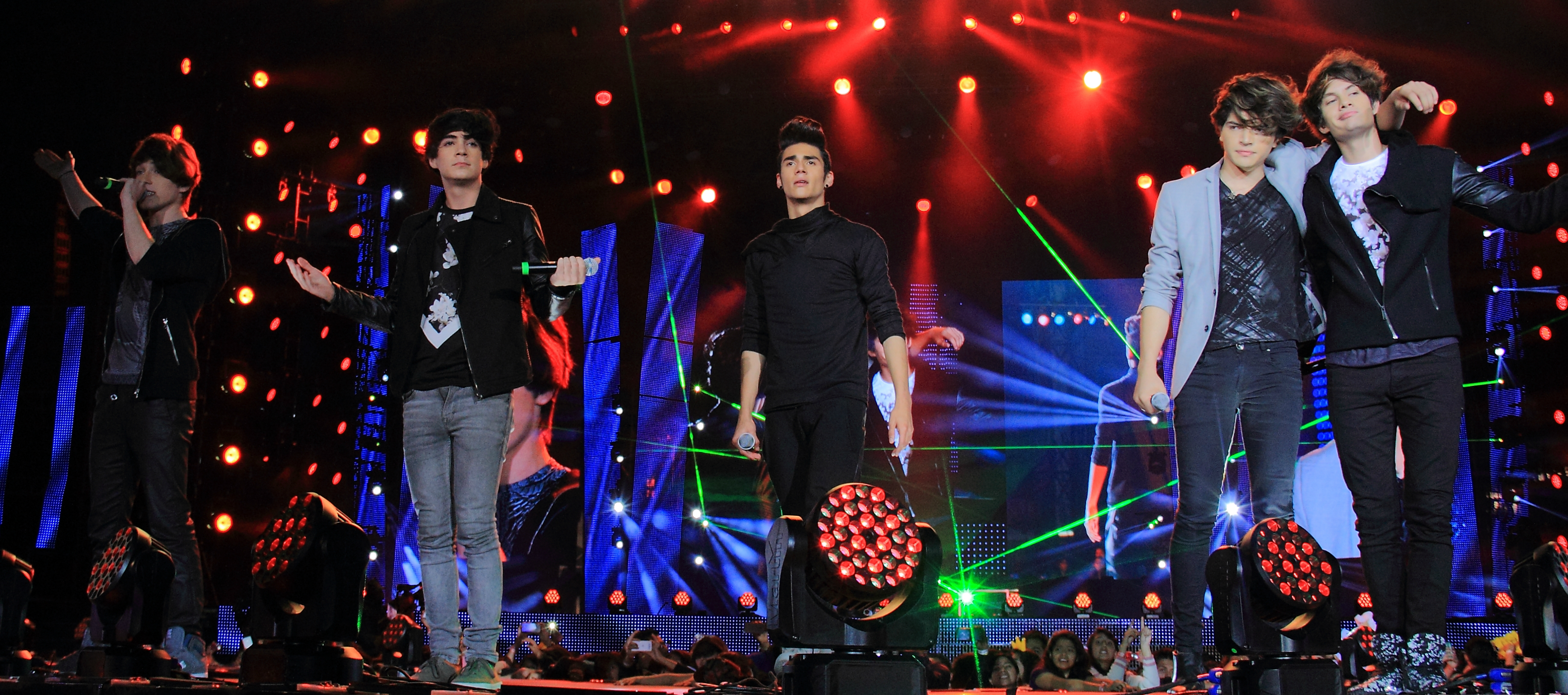 Integrantes de CD9 durante una interpretación en el concierto de los Premios Telehit, en el Foro Sol, Ciudad de México, Distrito Federal.